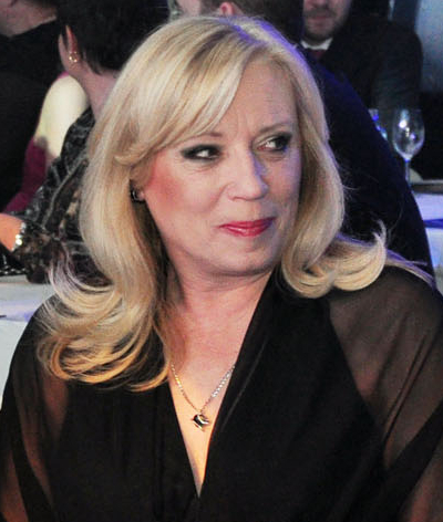 Iveta Radičová